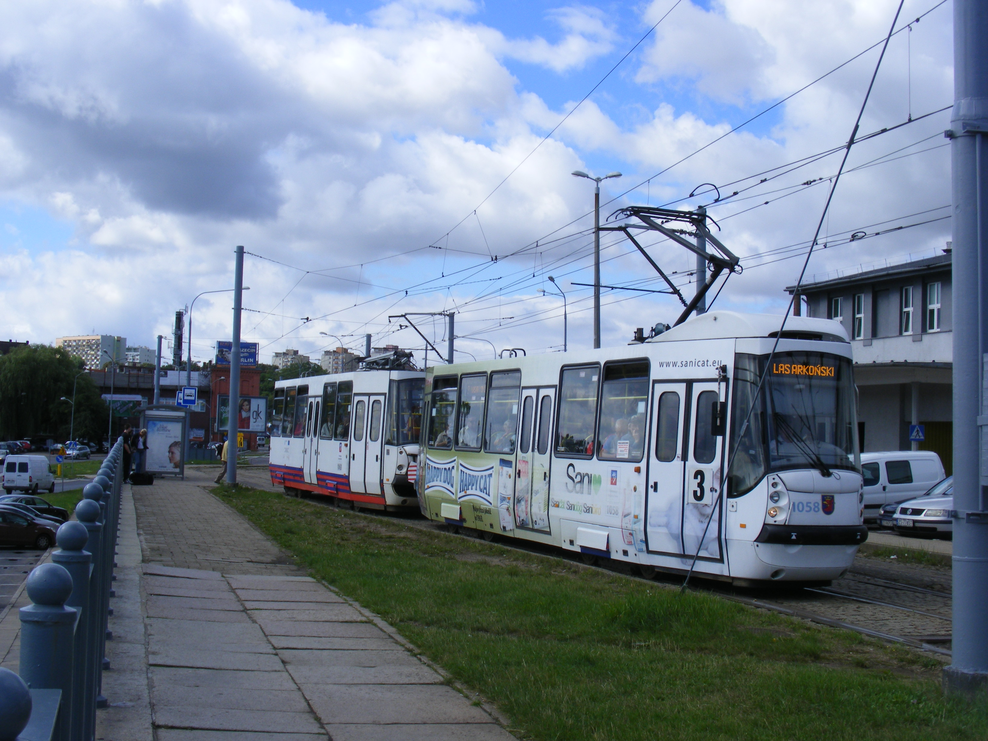 Szczecin